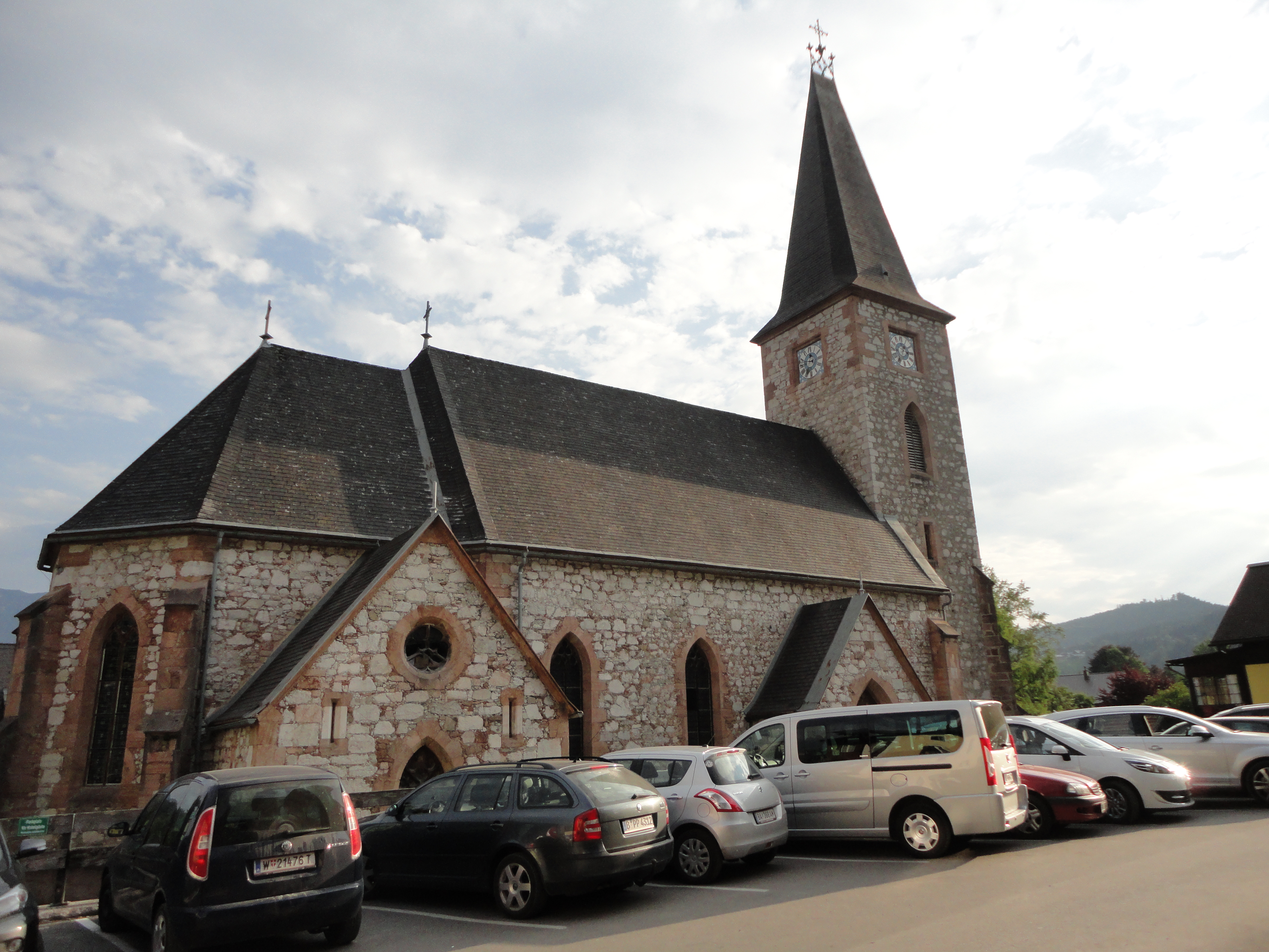 Kath. Pfarrkirche hl. Ägyd mit ehem. Friedhof